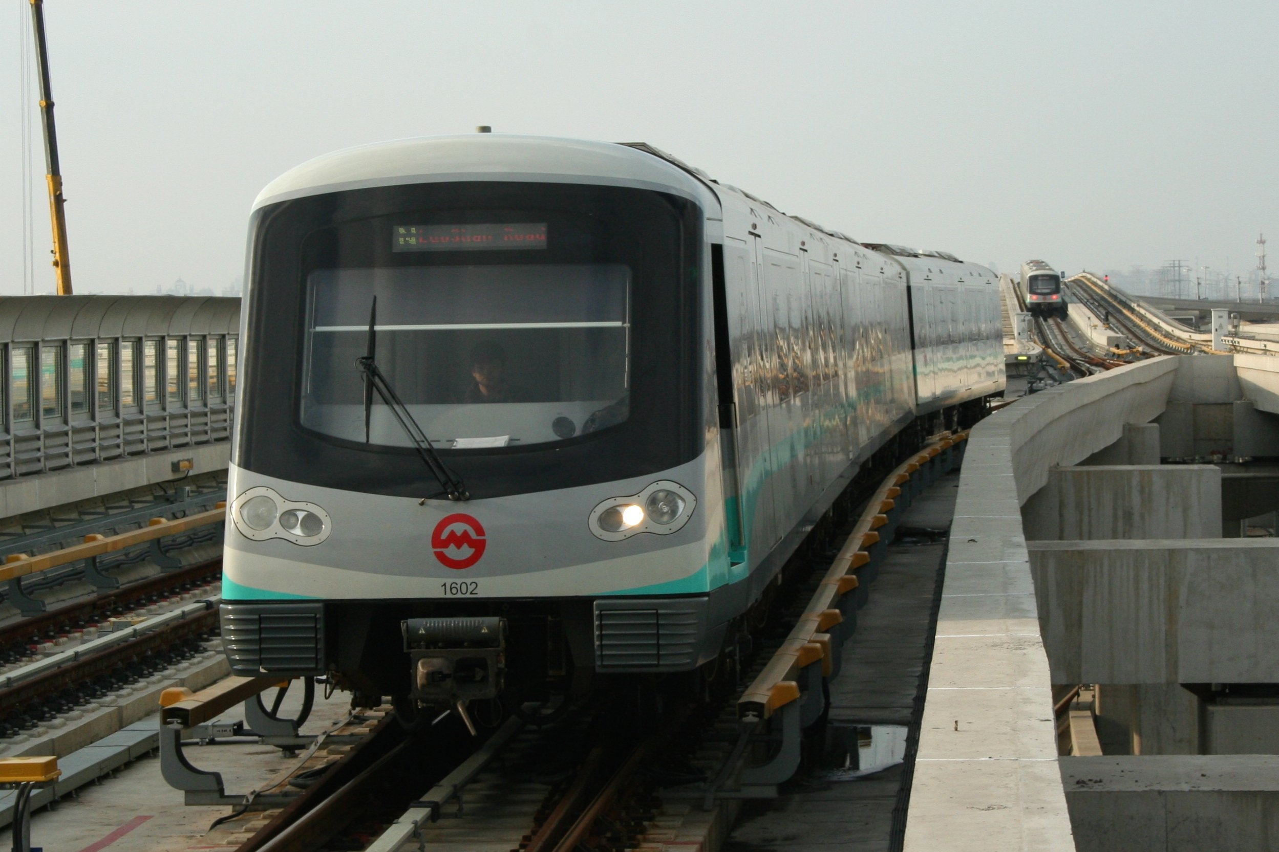 上海地鉄１６号線車両